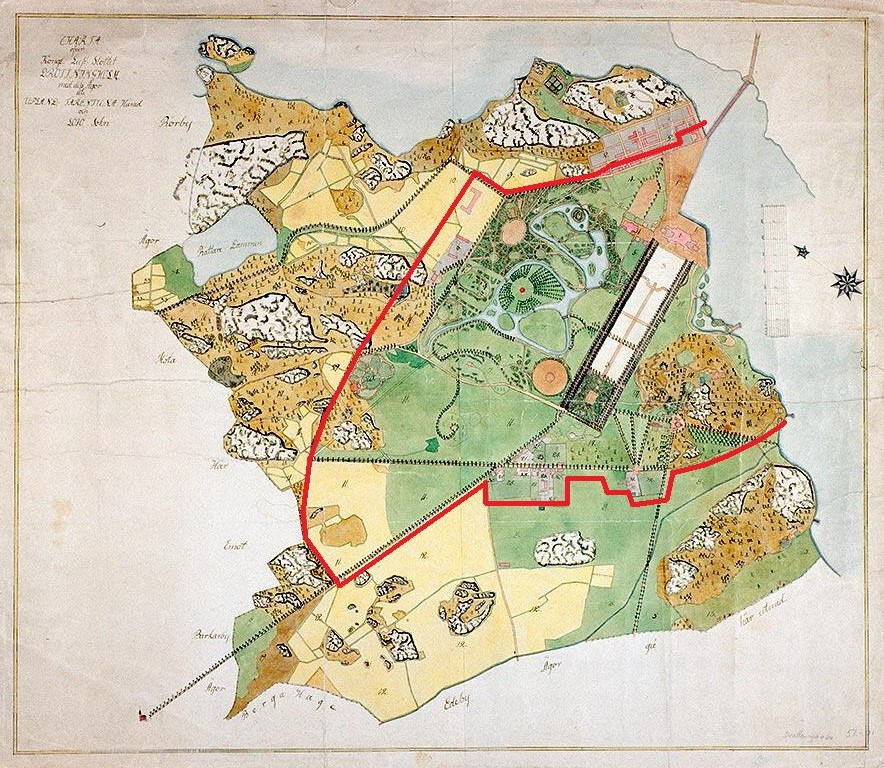 Karta över Drottningholms slottsområde, slutet av 1700-talet med gränserna för världsarvet "Protected area" enligt Statens Fastighetsverk och Slottsuppsyningsman, Drottningholms slottsförvaltning